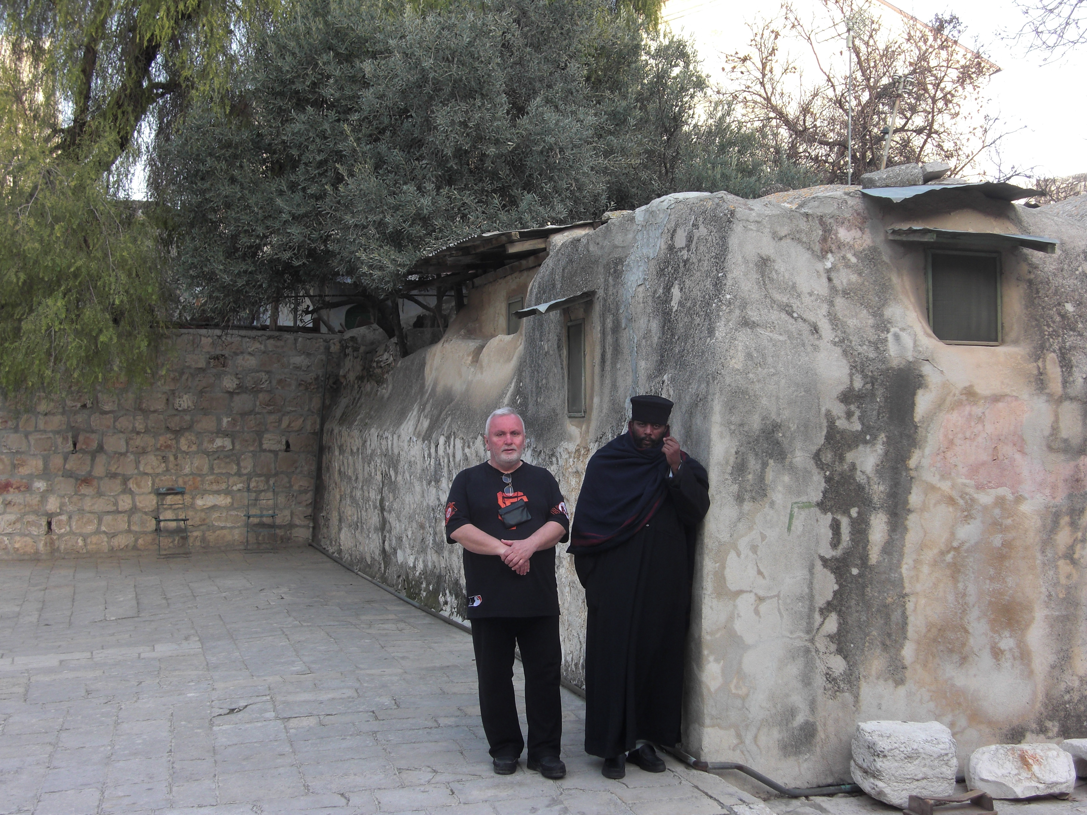 Jerzy Banak z mnichem koptyjskim, Jerozolima